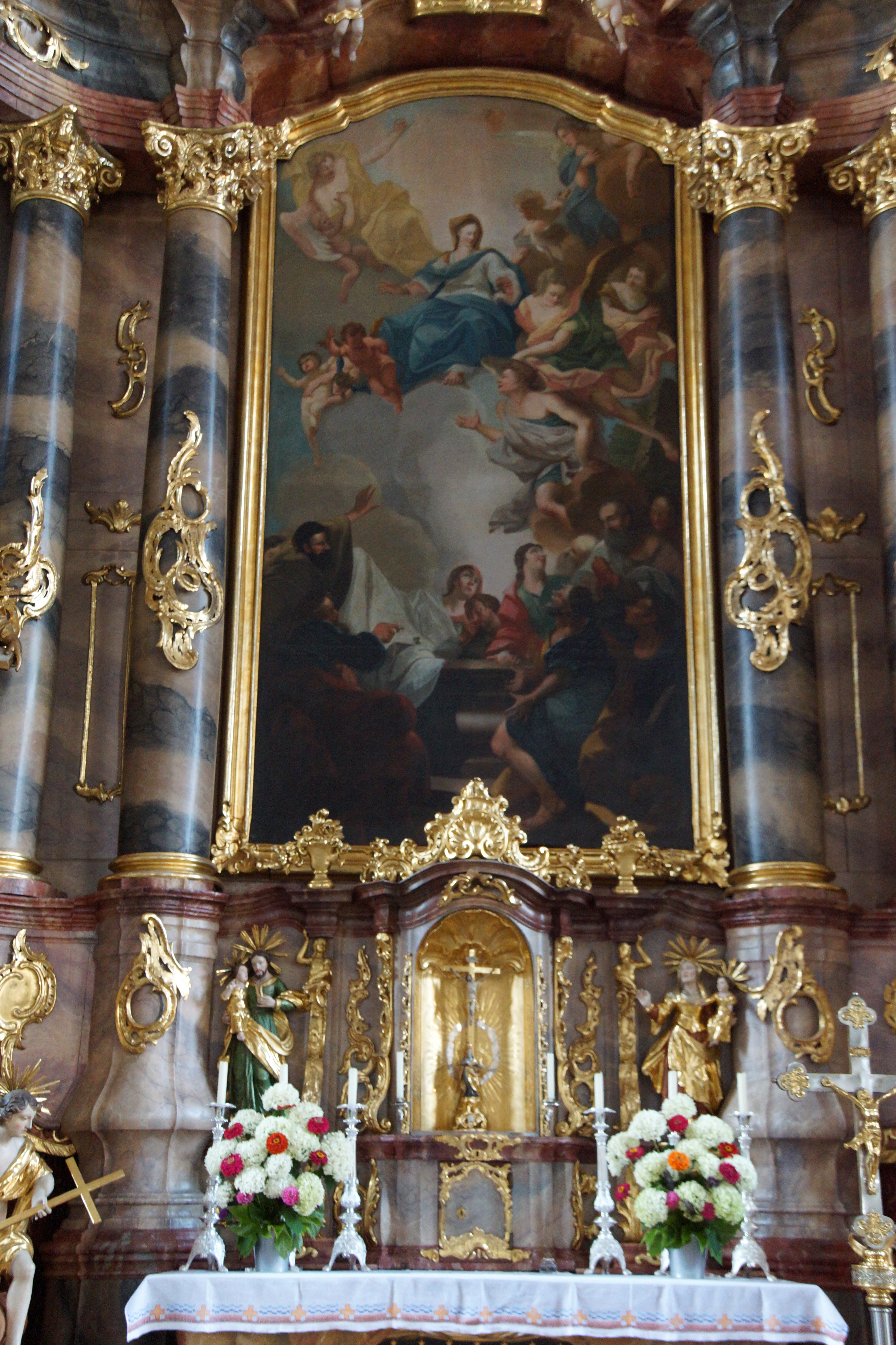 Die katholische Pfarrkirche Mariä Himmelfahrt in Berching in der Oberpfalz